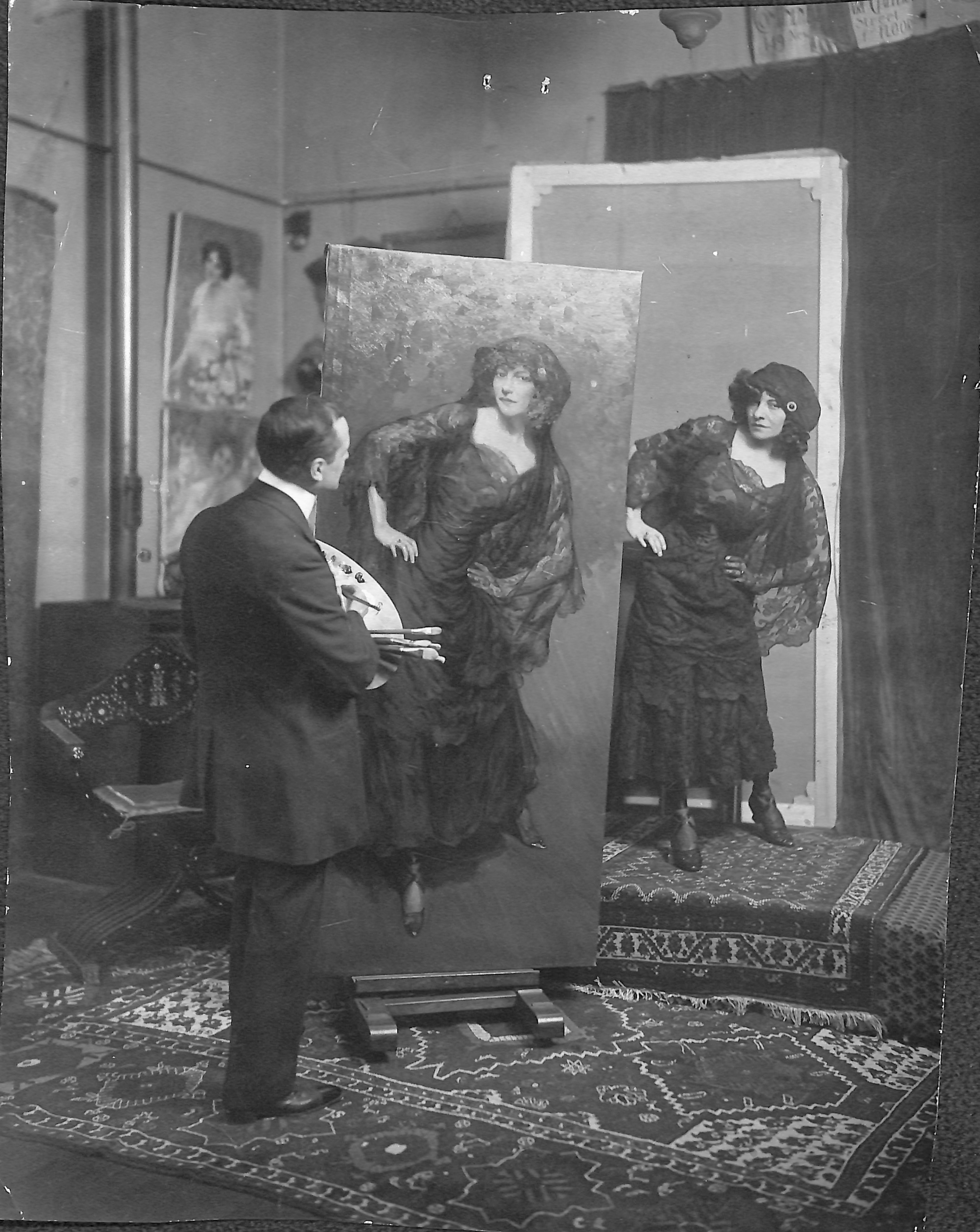 Mlle Polaire posant chez Juan Sala